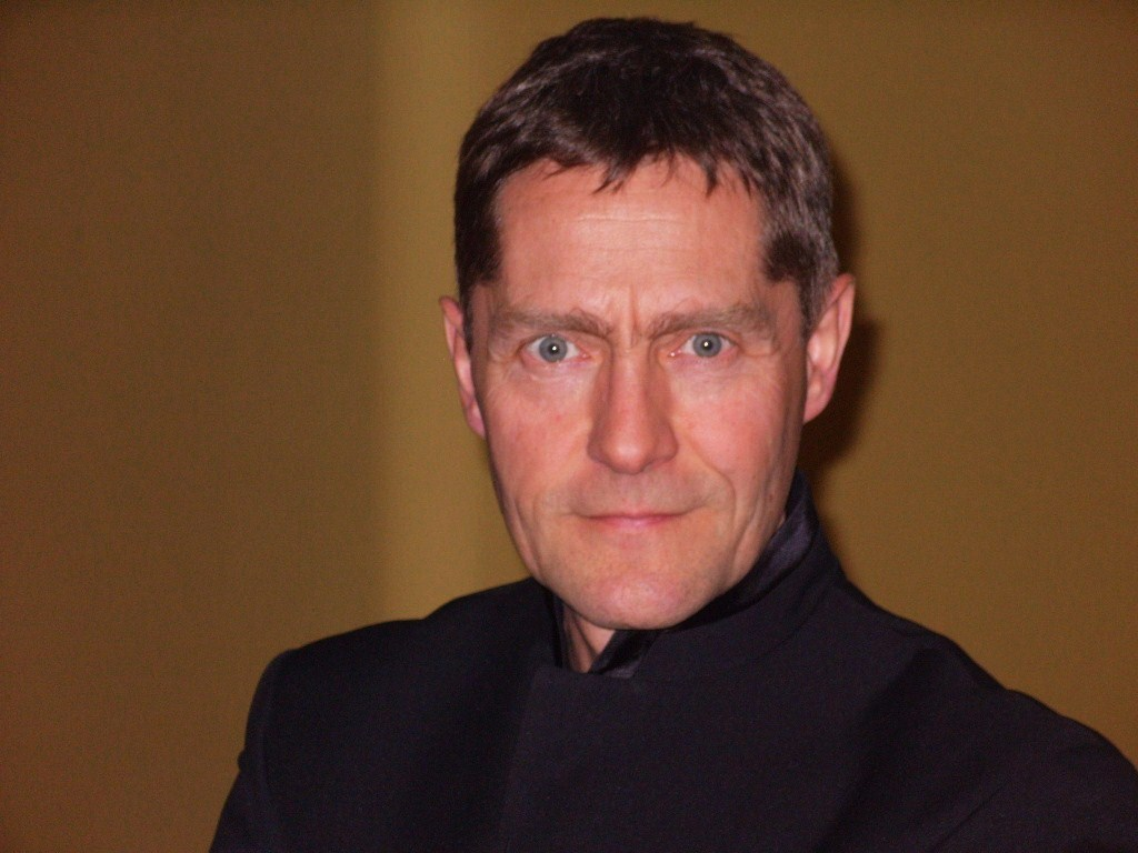 Udo Schenk während der Ohrkanus Verleihung 2010 im Babylon Kino in Berlin